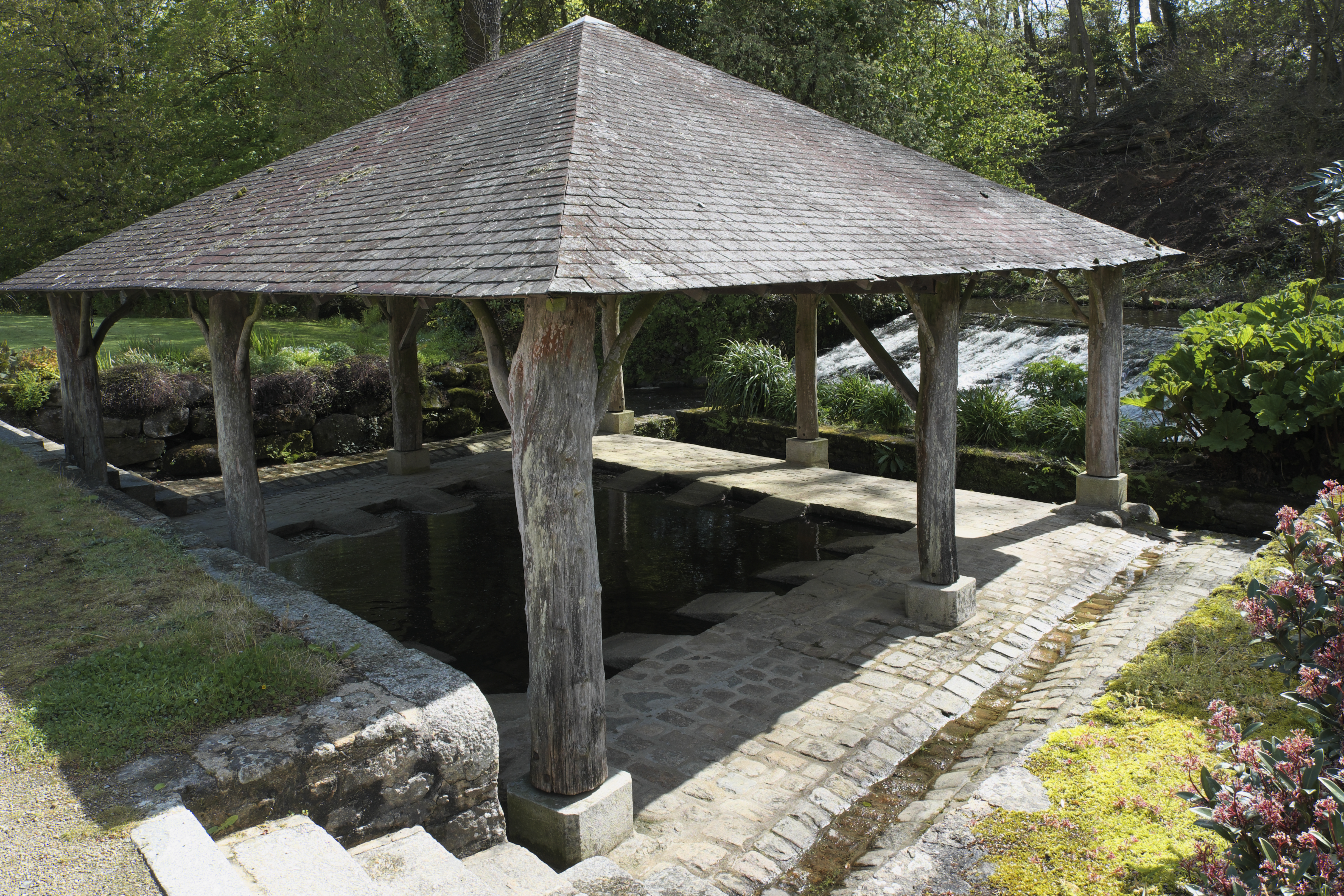 Waschhaus (lavoir) in Quintin im Département Côtes-d’Armor (Region Bretagne/Frankreich)